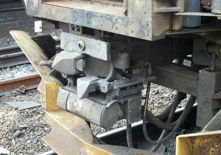 Exemplo de engate modelo BSI Compacto